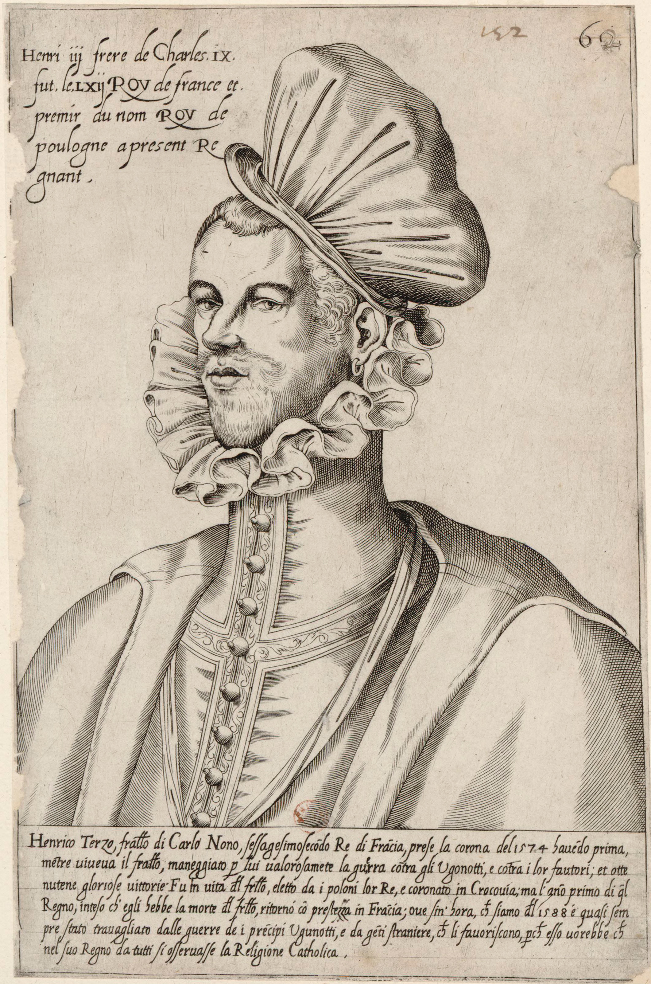 Portrait gravé de Henri III, en buste, de 3/4 dirigé à gauche.